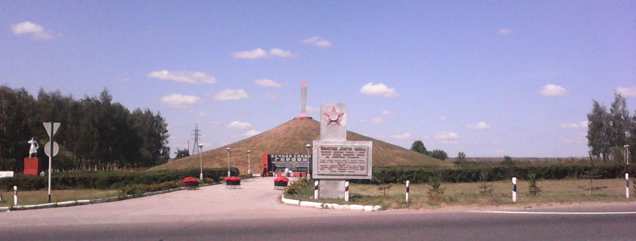 Mound of Glory, Plavsk